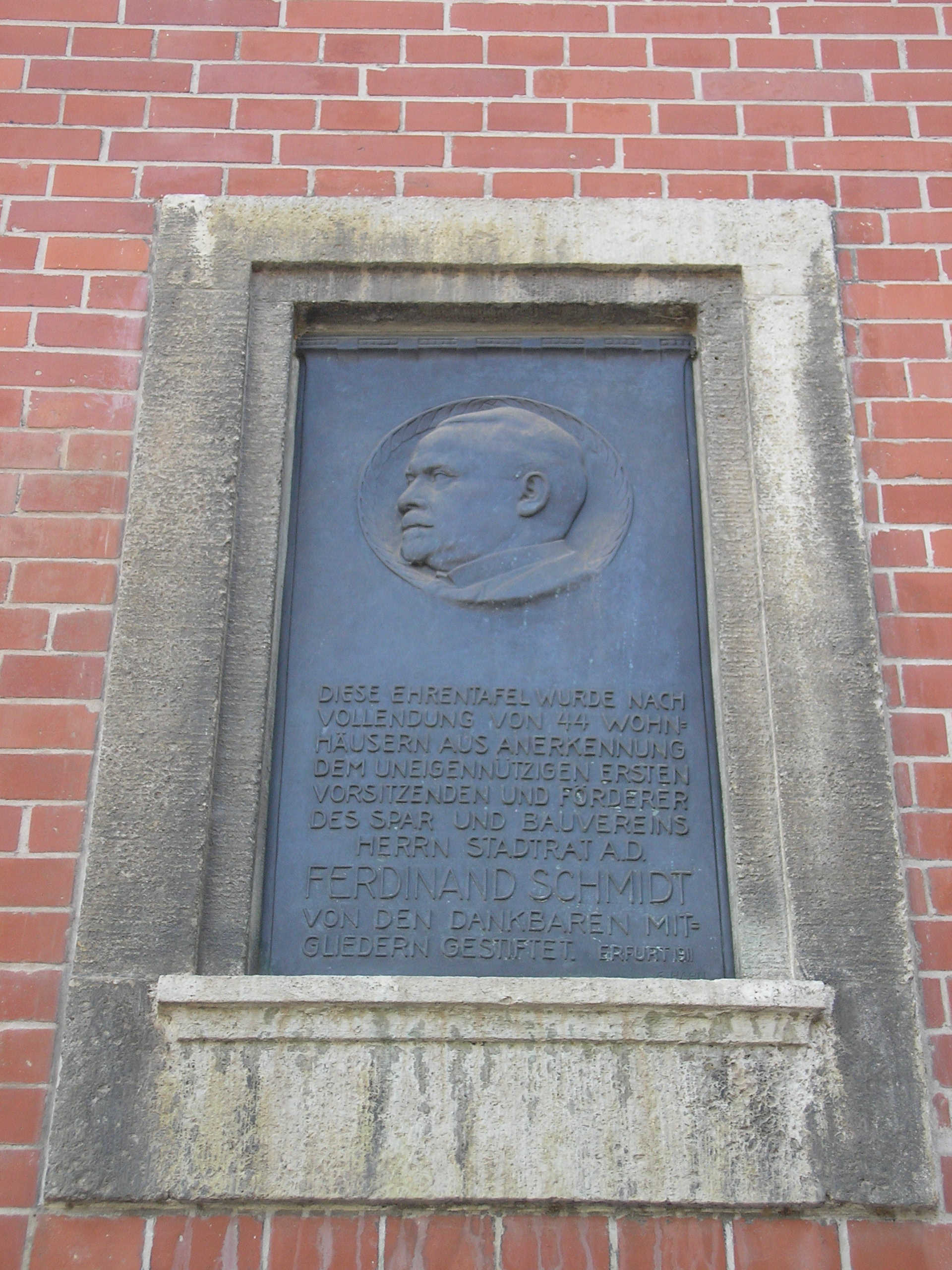 Denkmal für Ferdinand Schmidt, den Begründer einer Wohnungsbaugenossenschaft, an einem Haus in Erfurt.